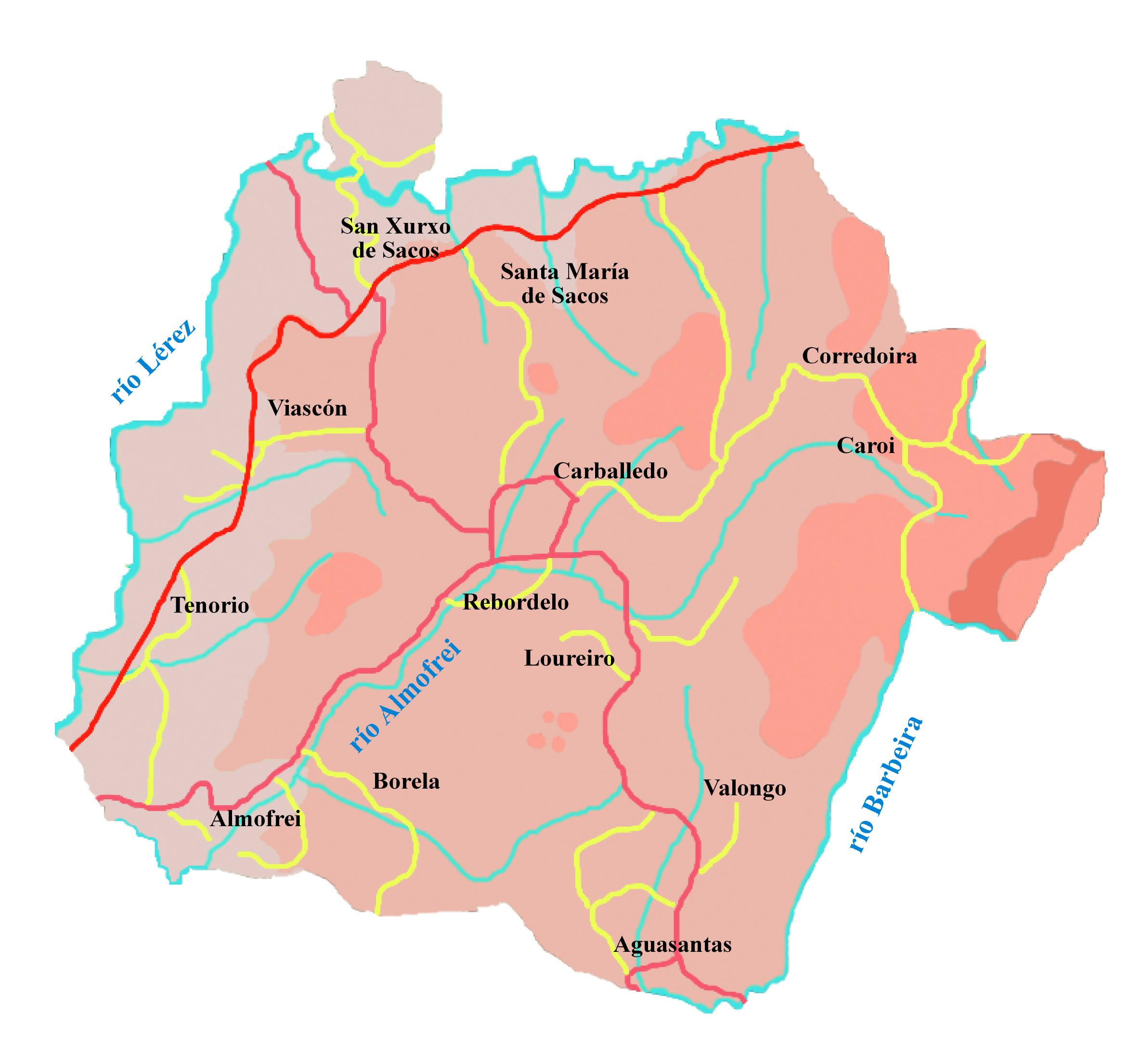 Mapa do Concello de Cotobade